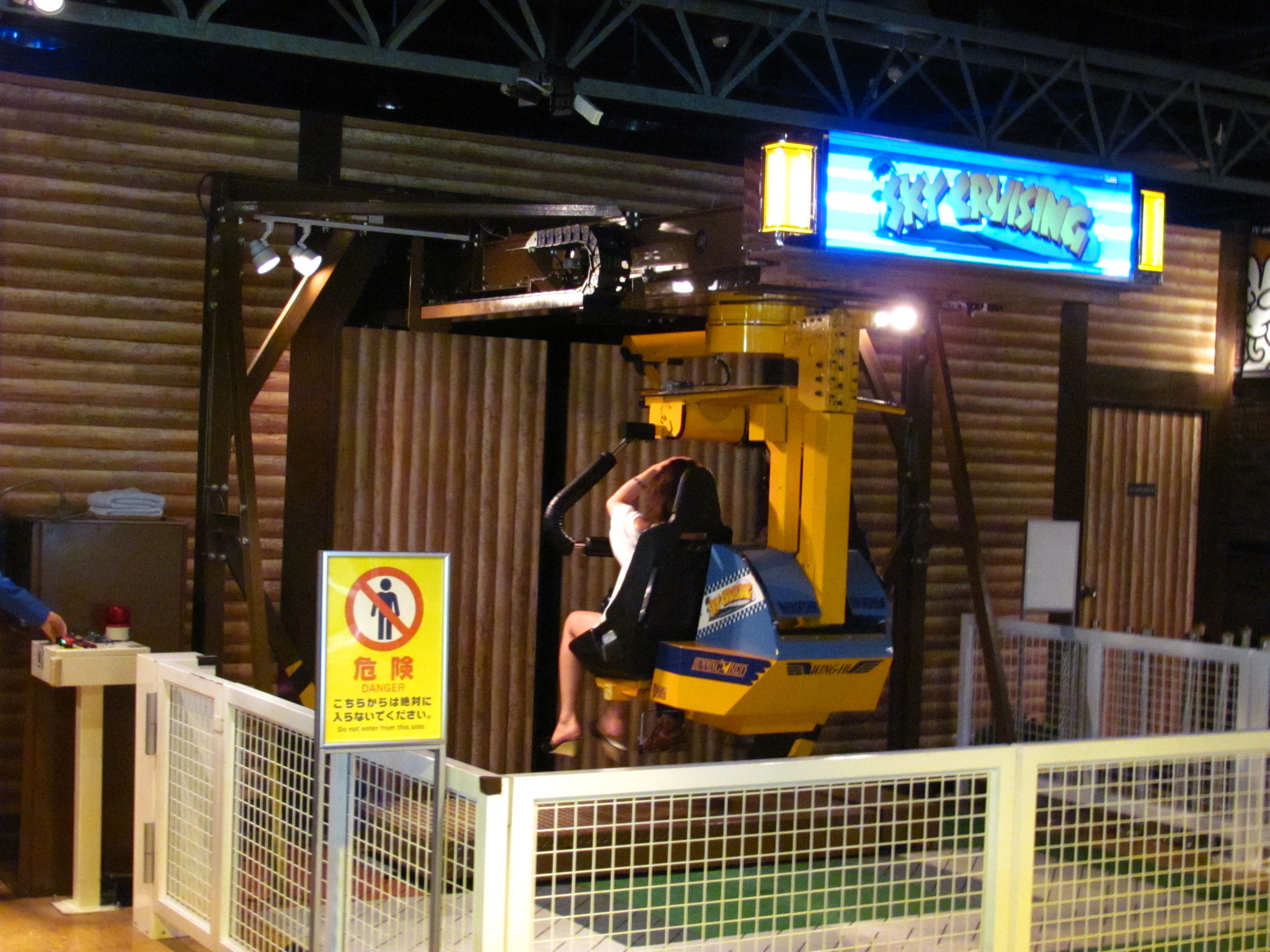 SEGA Joypolis